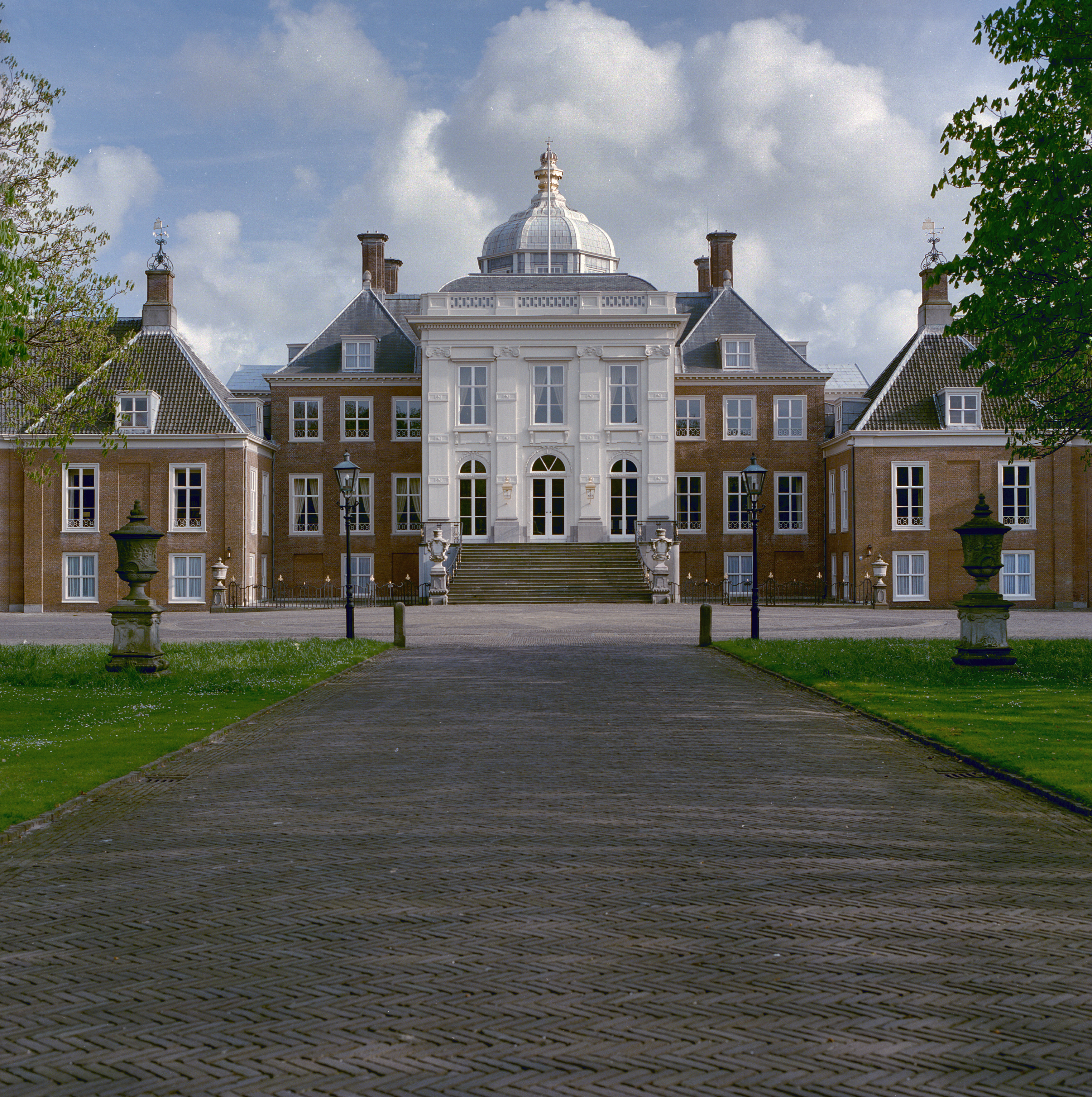 Huis ten Bosch: Overzicht voorgevel (opmerking: Gefotografeerd voor Kastelen en Buitenplaatsen in Zuid-Holland)